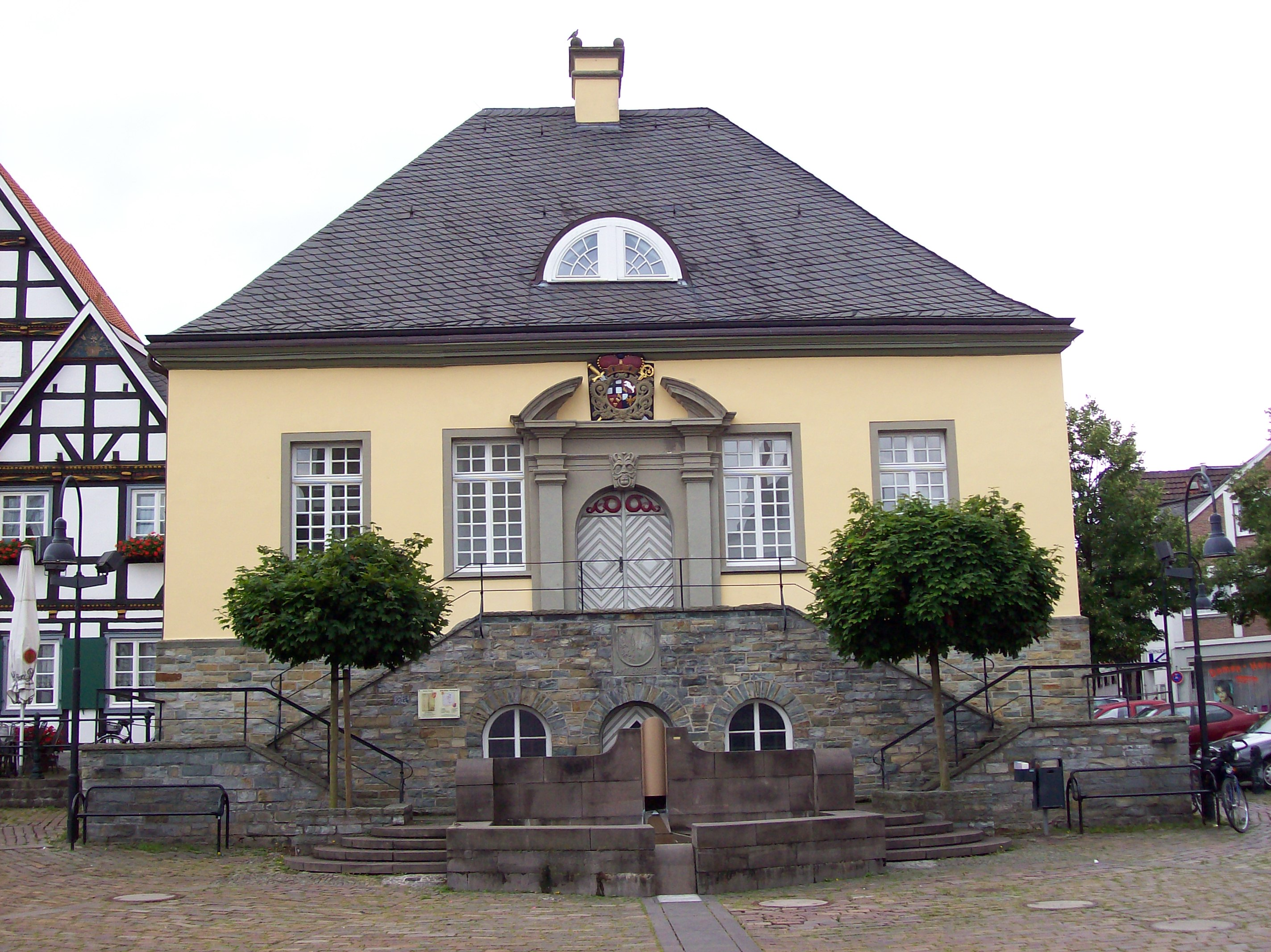 Altes Rathaus (ehem. Gogerichtsgebäude) in Erwitte (Germany)